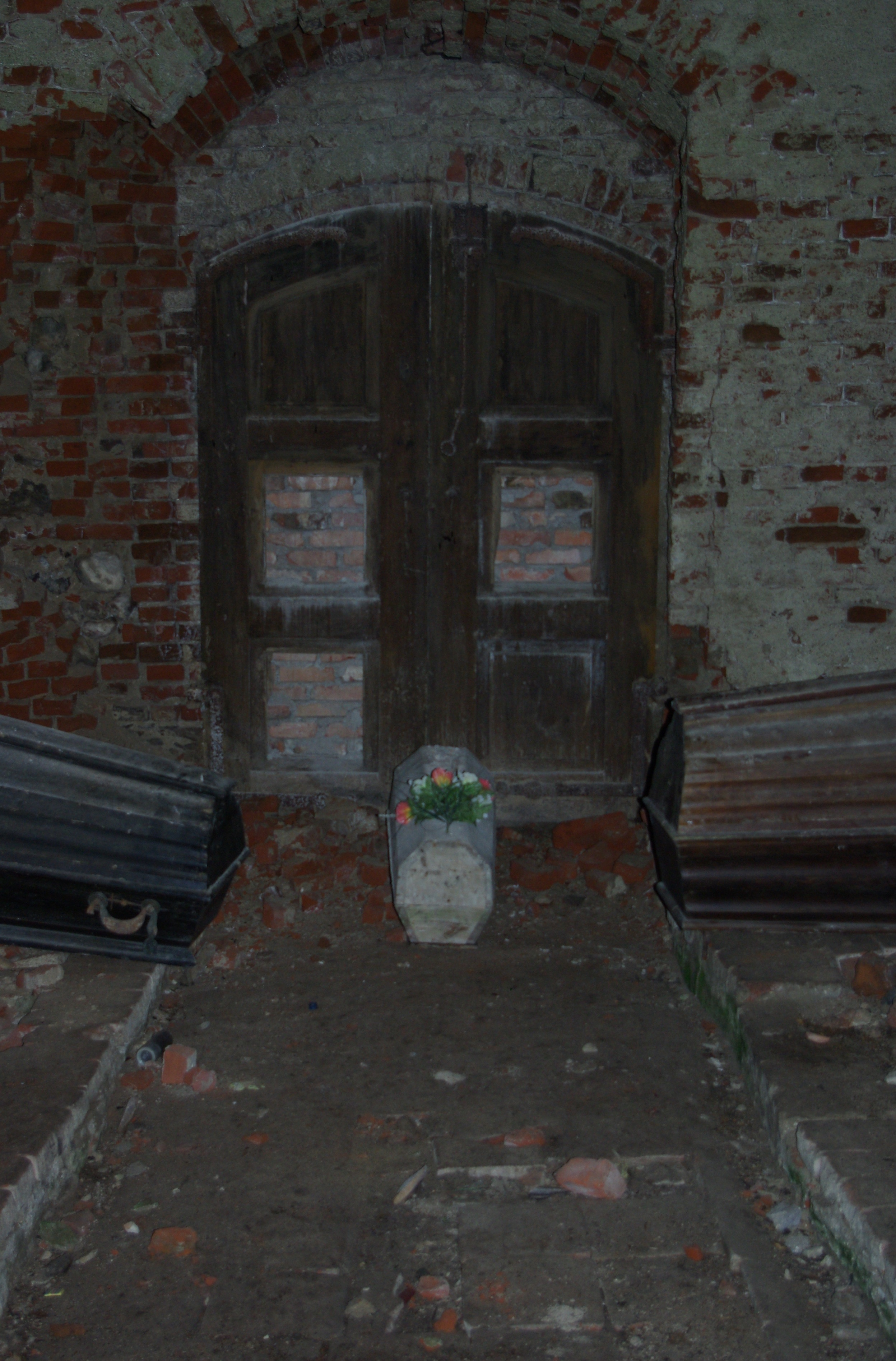 Piramida w Rapie